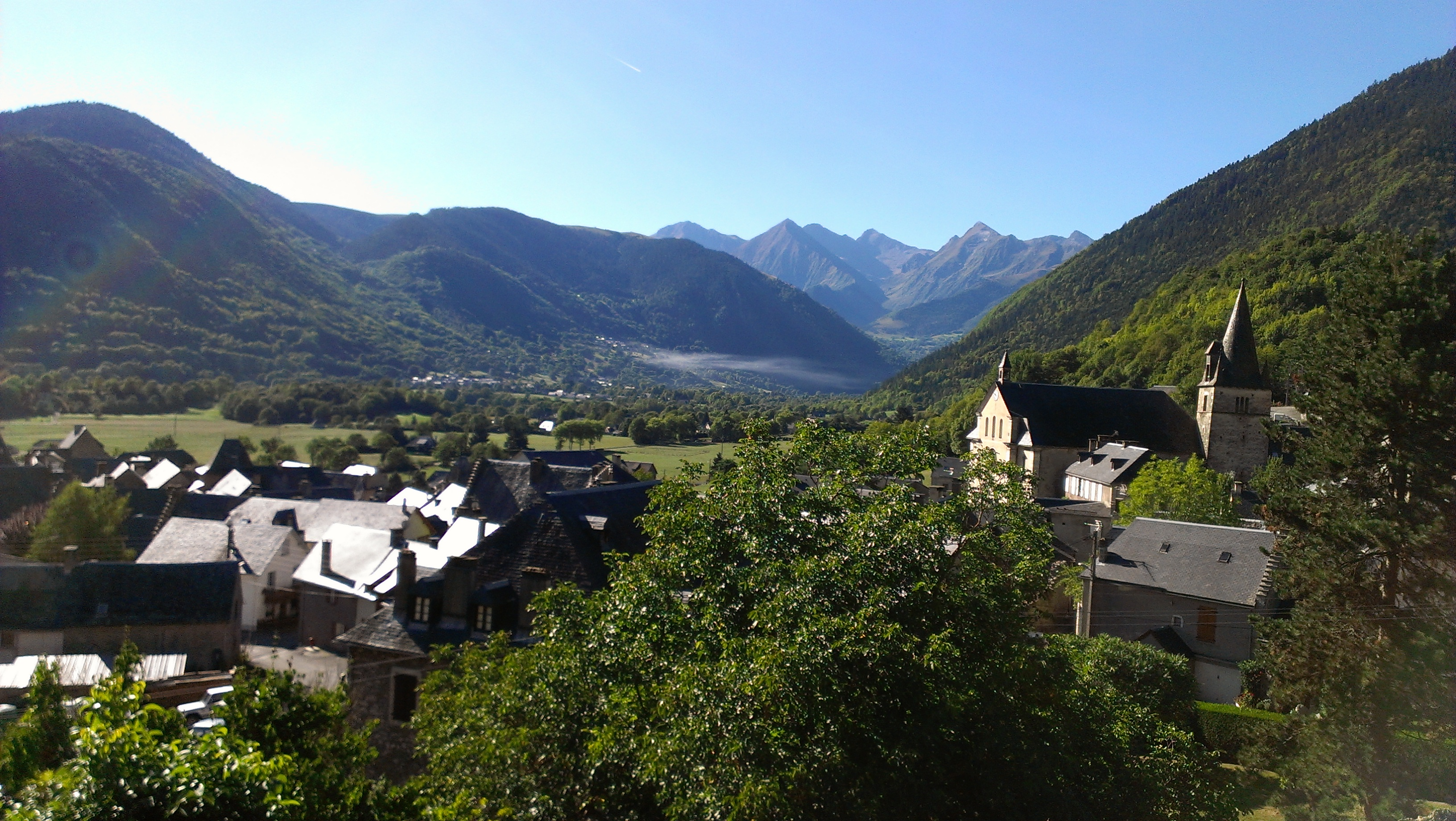 Vue générale d'Ancizan